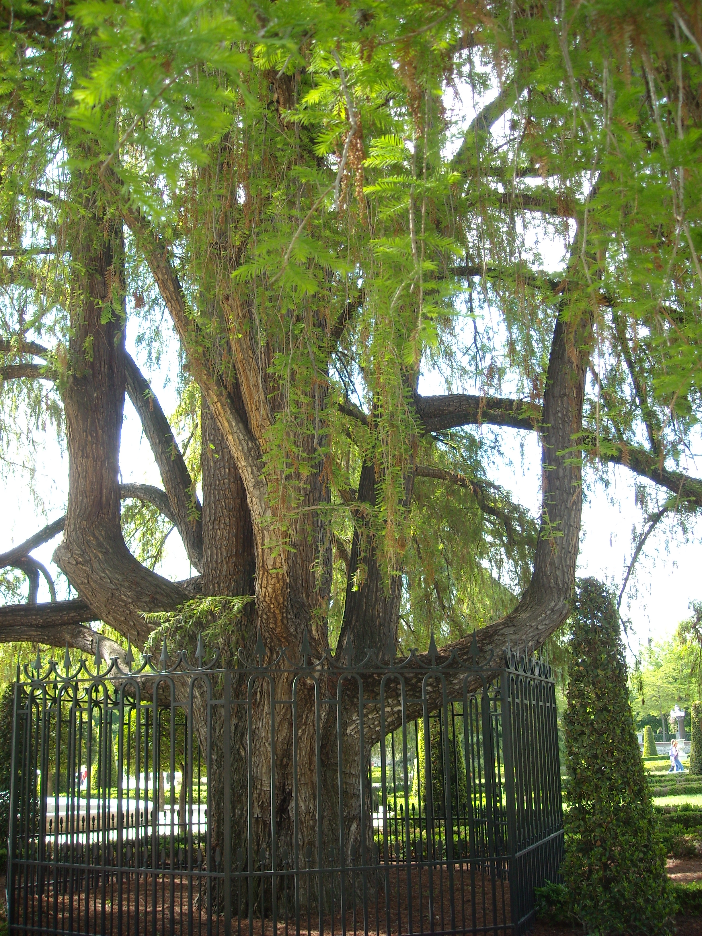 Porte del ahuehuete de los Jardines del Buen Retiro, Madrid